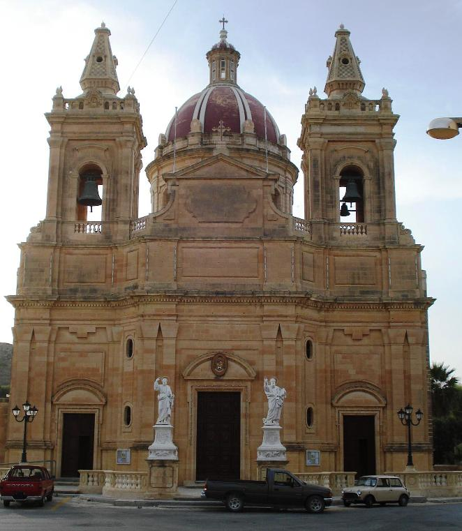 Die Kirche in Ghasri (auf Gozo / Malta)